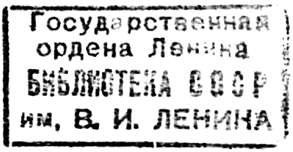 Книжный штамп Государствнной библиотеки СССР им. В. И. Ленина.